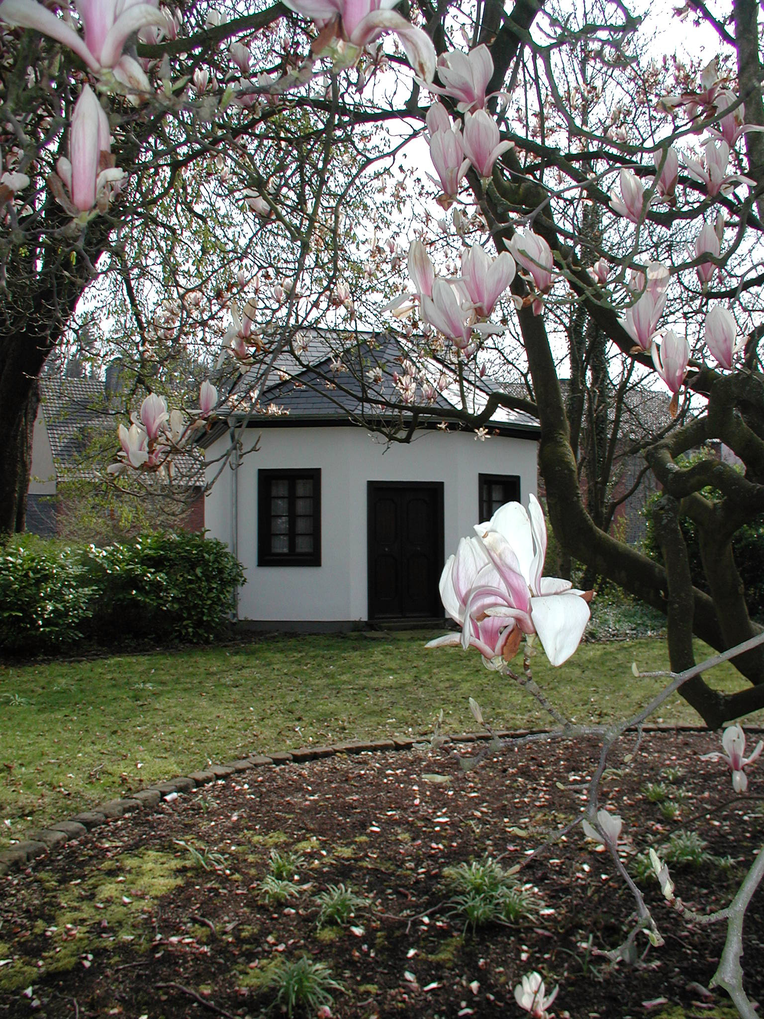 Alt-Hürth, Frühling 2008